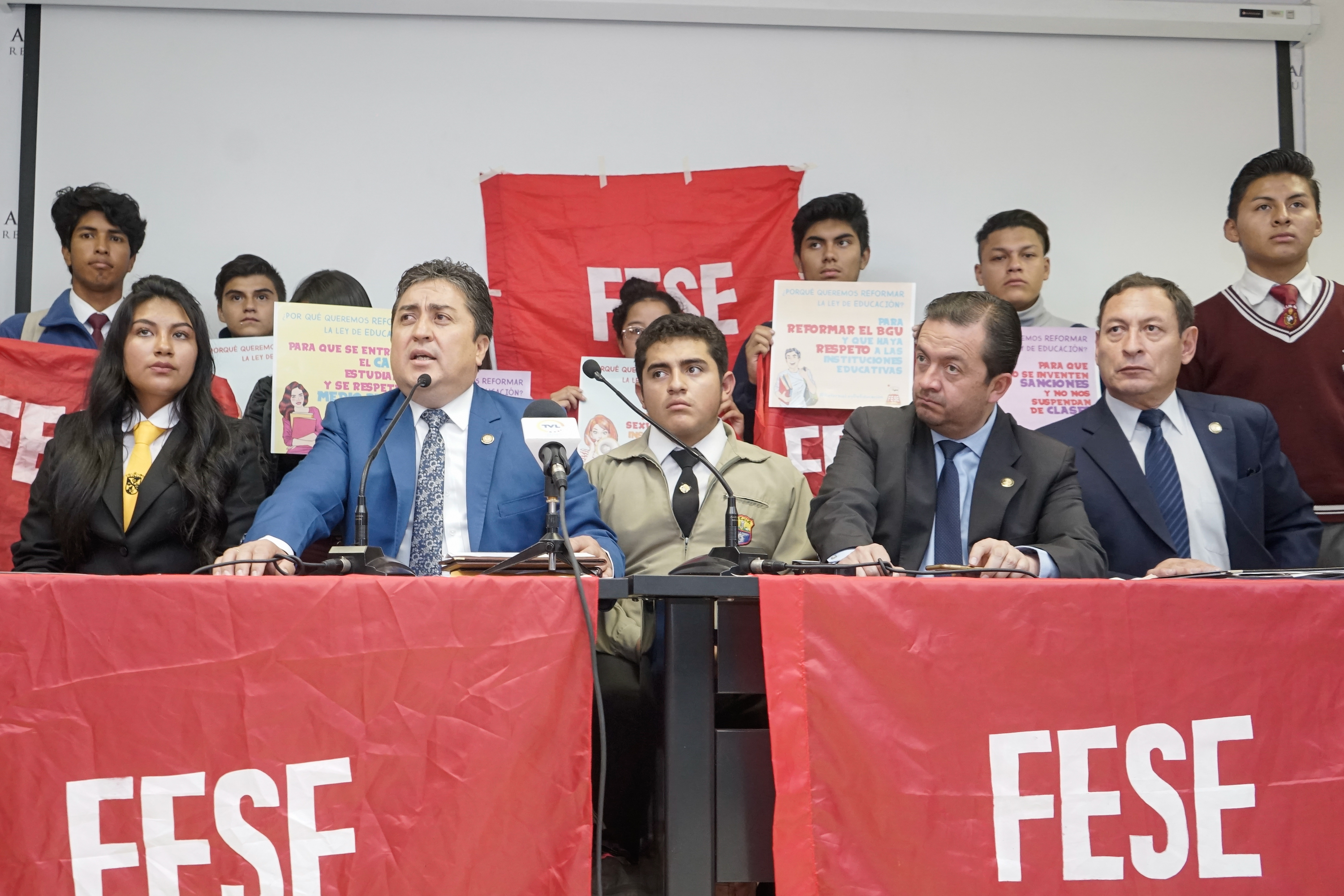 TEMA: Presenta proyecto de Ley Reformatoria a la Ley Orgánica Intercultural Bilingüe Fotografía por: Alexander Moya / Asamblea Nacional